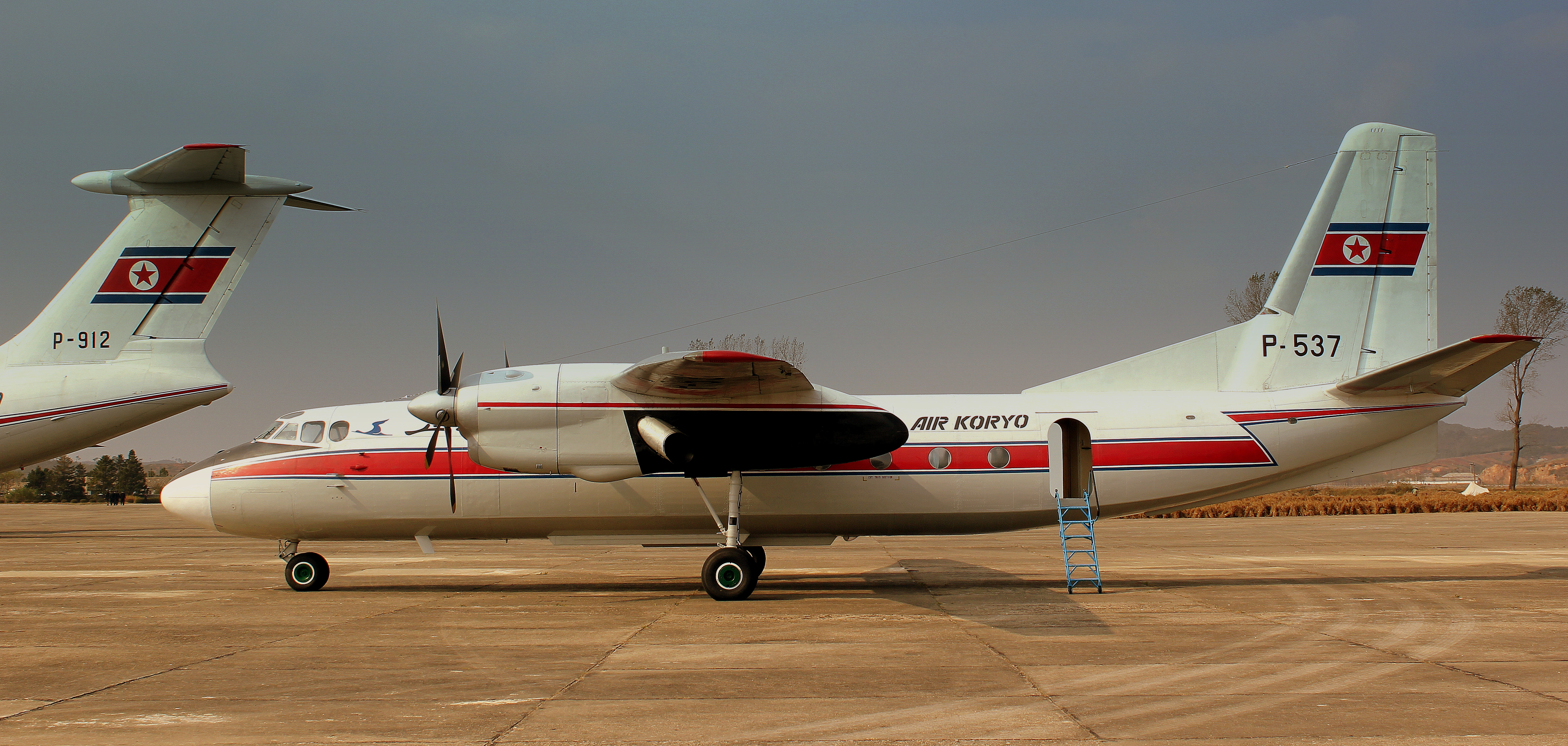 P537 ANTONOV AN24 OF AIR KORYO AT HAMHUNG SONDOK AIRFIELD DPRK NORTH KOREA OCT 2012